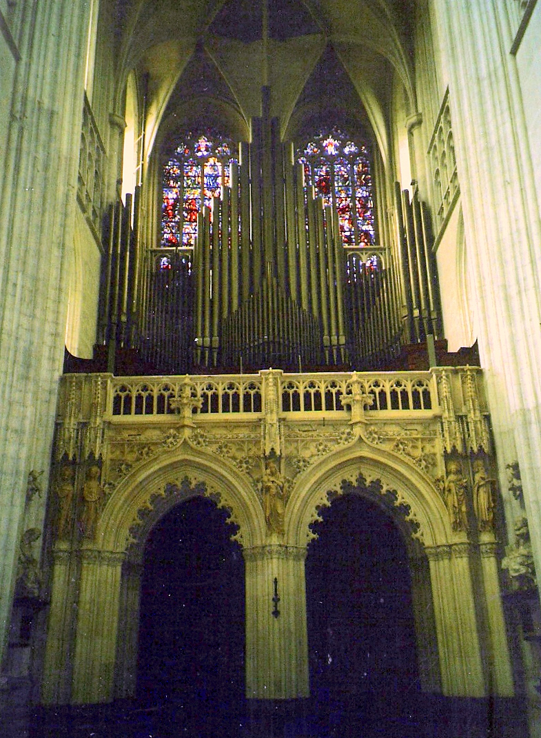 MECHELEN - Malines . Cor i orgue de la catedral de Sin Rombout